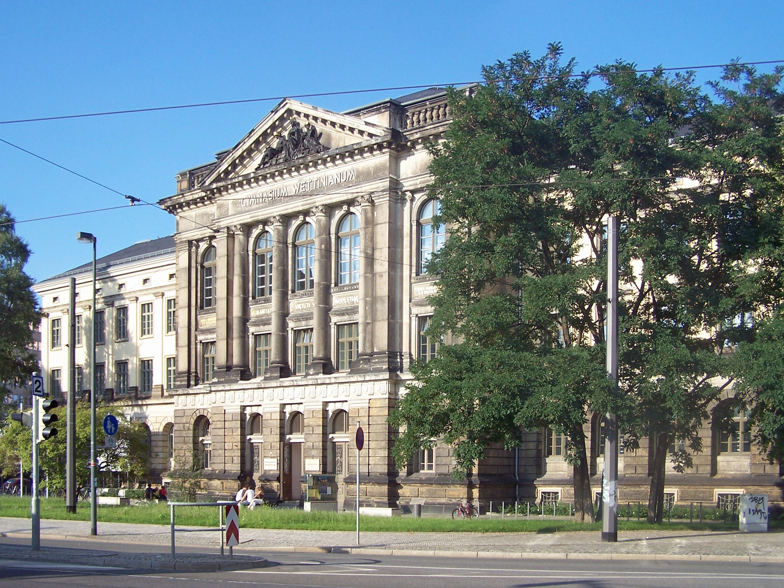 ehem. Wettiner Gymnasium Dresden, heute Haupthaus der Musikhochschule „Carl Maria von Weber“ am Wettiner Platz.